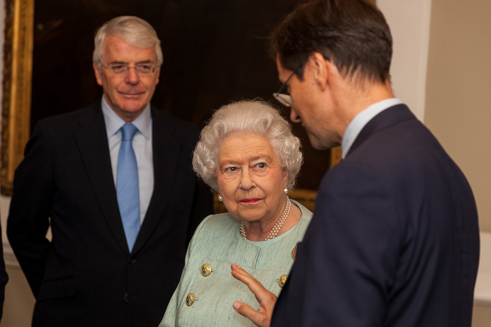 18 November 2014, cht.hm/11ieQ9K